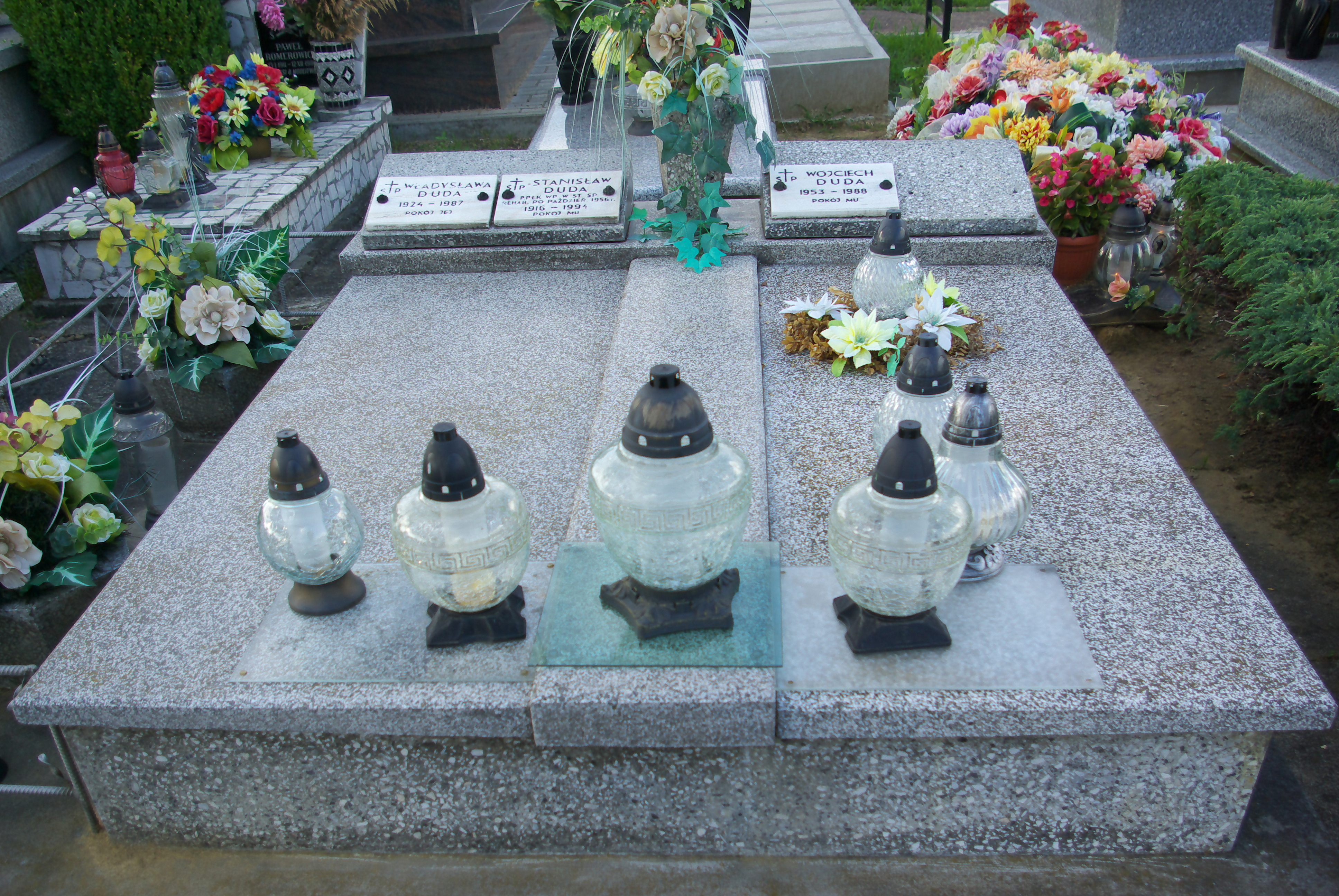 Grobowiec rodziny Duda na Cmentarzu Centralnym w Sanoku. Pochowany ppłk Stanisław Duda